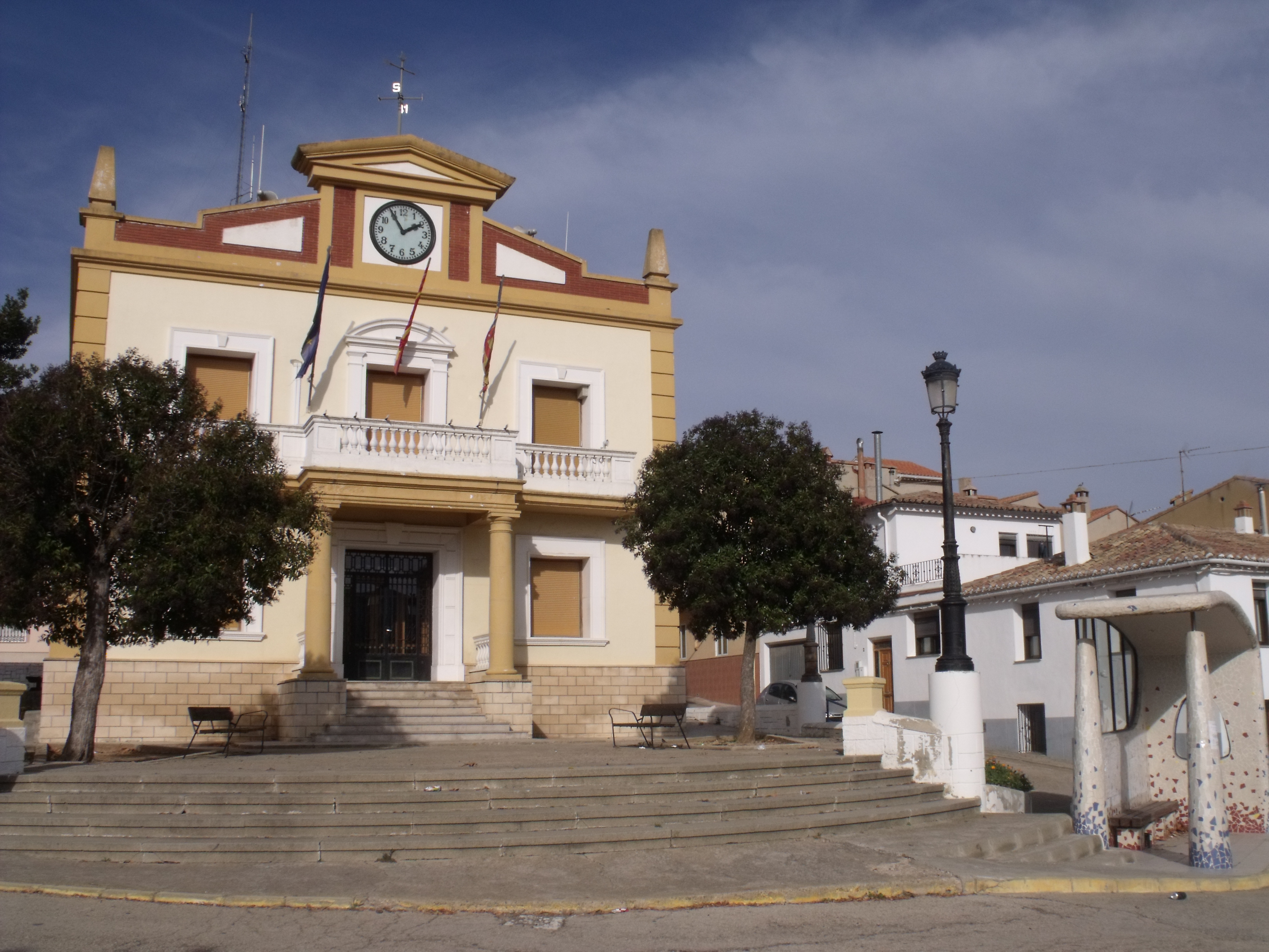 Fachada del Ayuntamiento